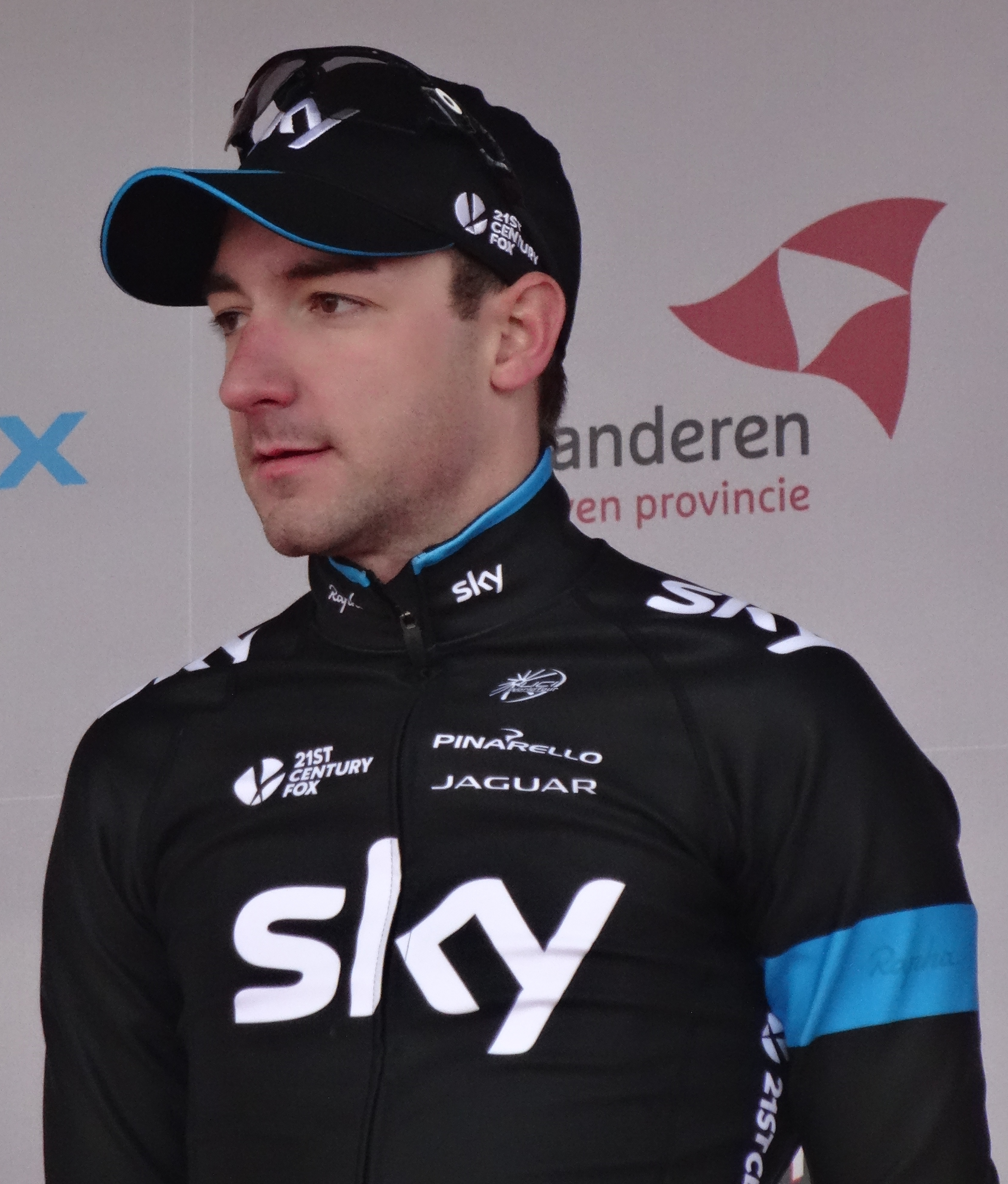 Reportage réalisé le dimanche 1er mars à l'occasion du départ et de l'arrivée de Kuurne-Bruxelles-Kuurne 2015 à Kuurne, Belgique.